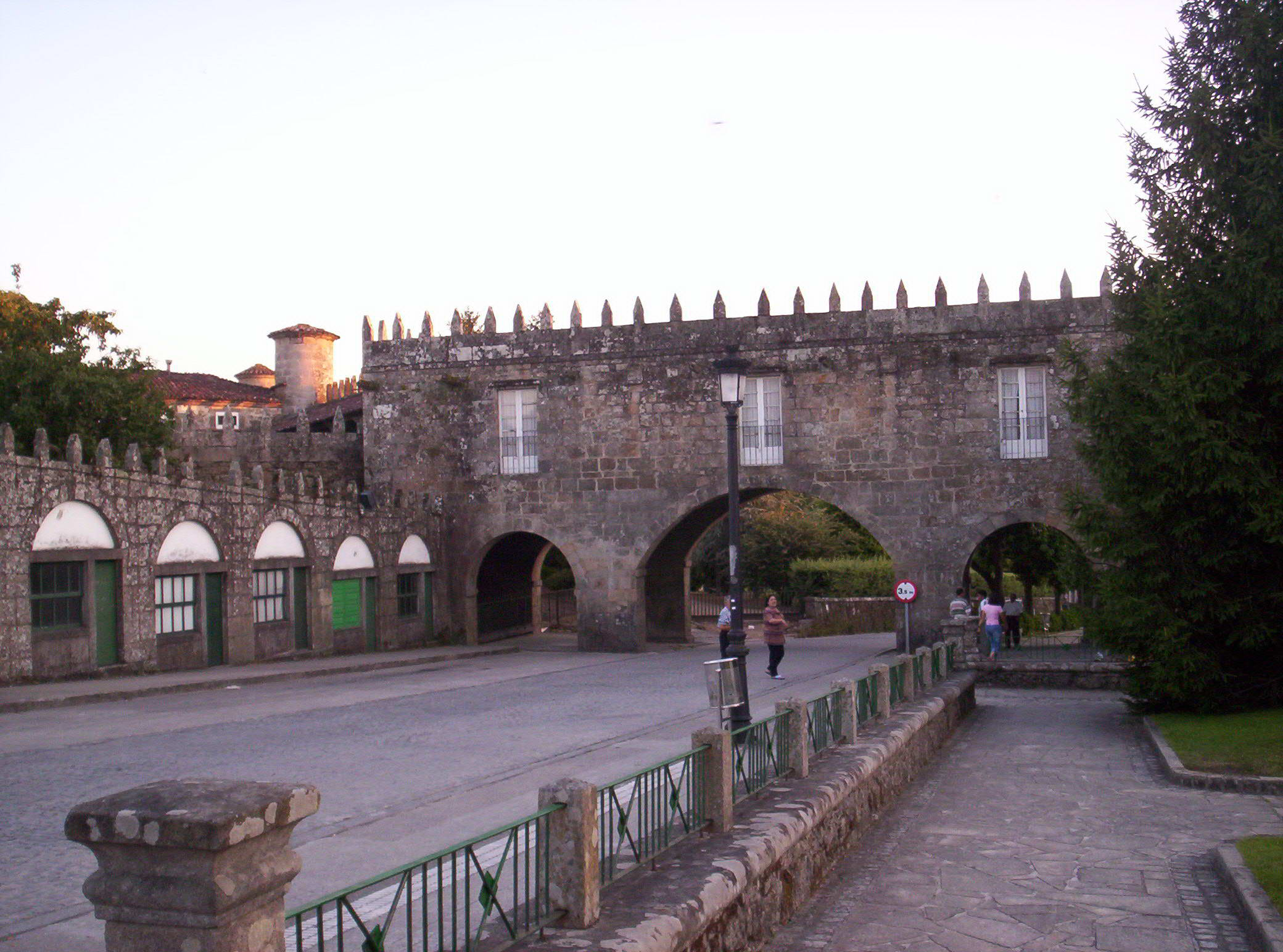 Pazo do Cotón, Negreira, Galiza